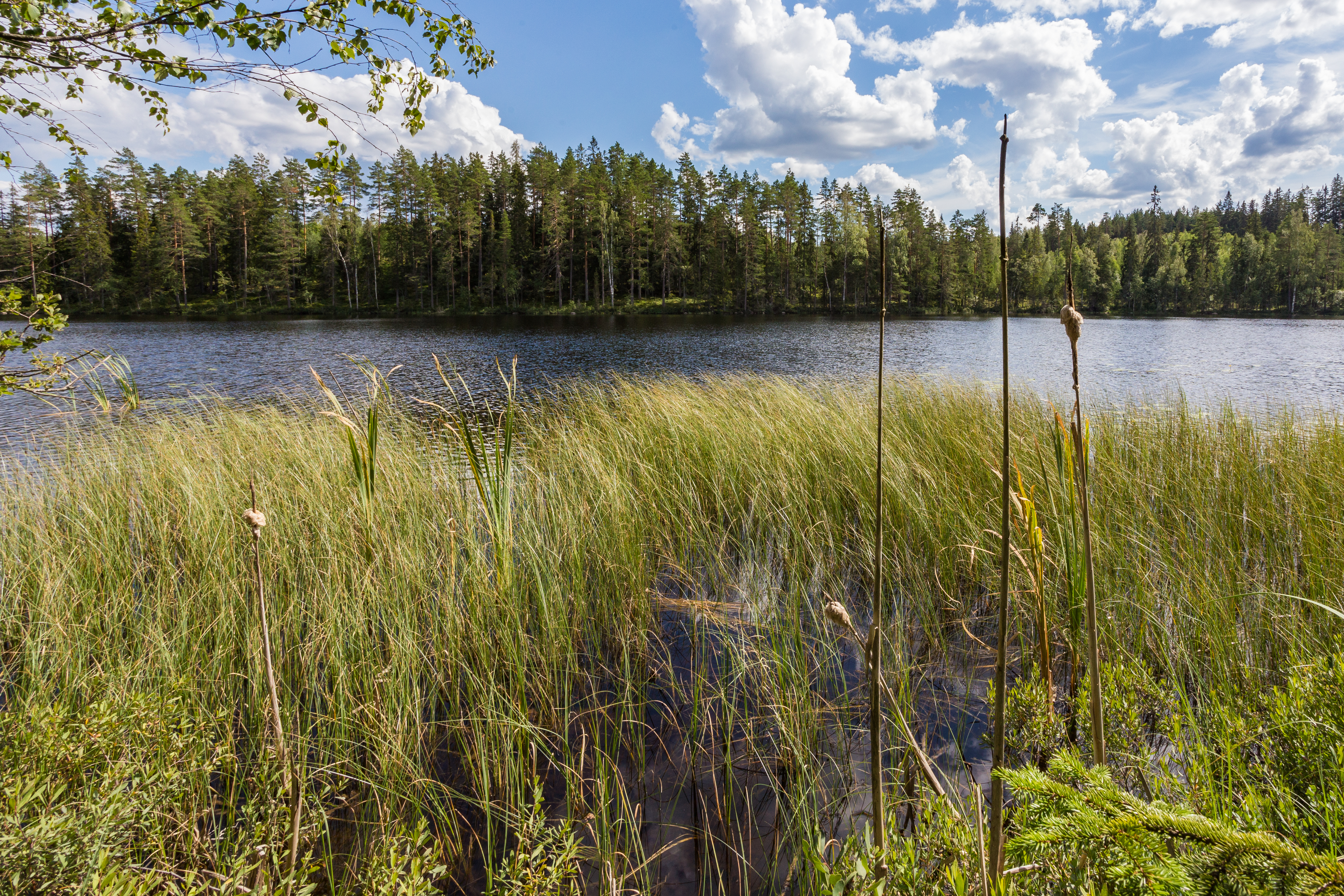 Lilla Jälken, Garpenberg, Hedemora kommun, Dalarnas län, Sverige